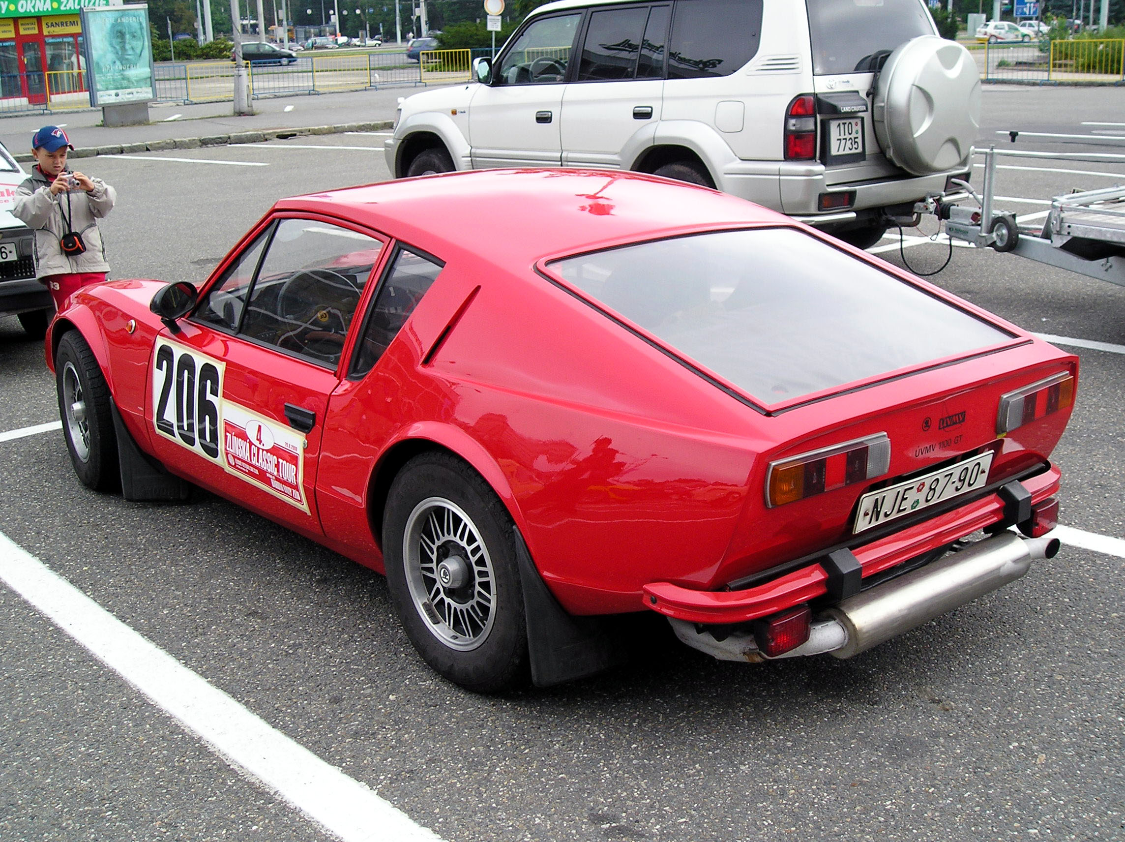 Skoda 1100GT